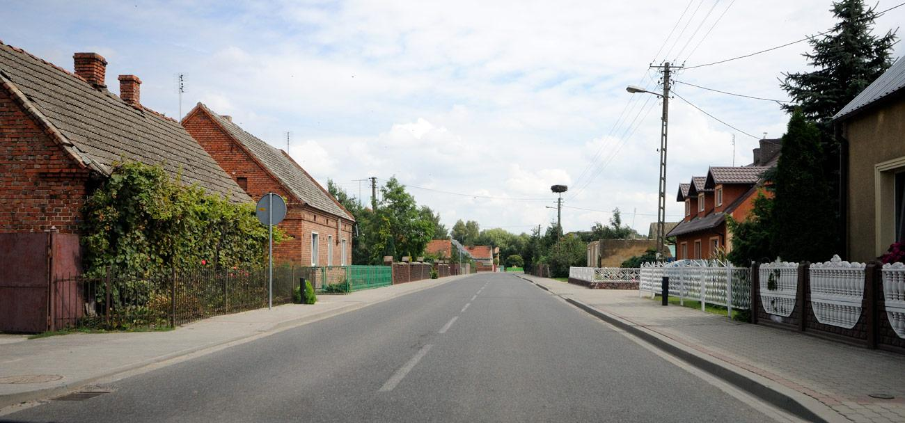 Główna droga wiodąca przez Wolkowo.